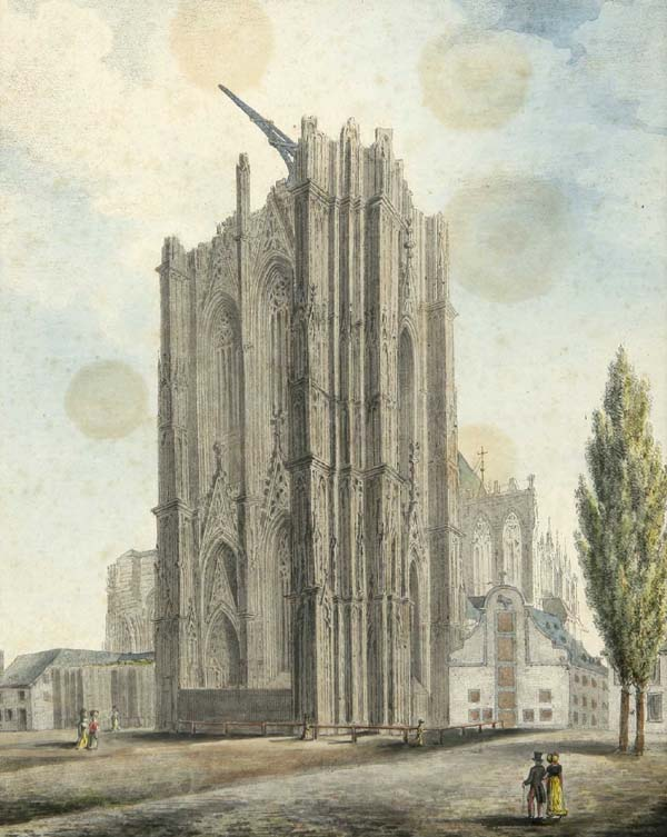 Der Kölner Dom. Alt colorierte Lithographie aus "Sammlung von Ansichten oeffentlicher Plätze, merkwürdiger Gebäude und Denkmäler in Köln" von Anton Wünsch lithographiert nach der Zeichnungen von Johann Peter Weyer, 1827 herausgegeben 24.5x20 cm